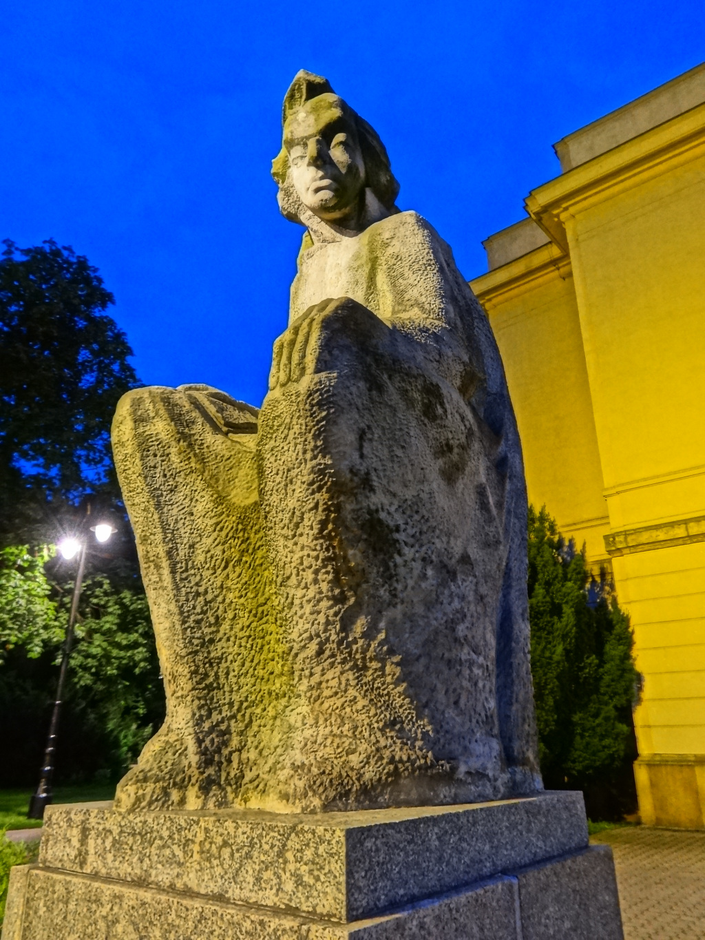 Rzeźba Fryderyka Chopina przed frontem Filharmonii Pomorskiej w Bydgoszczy